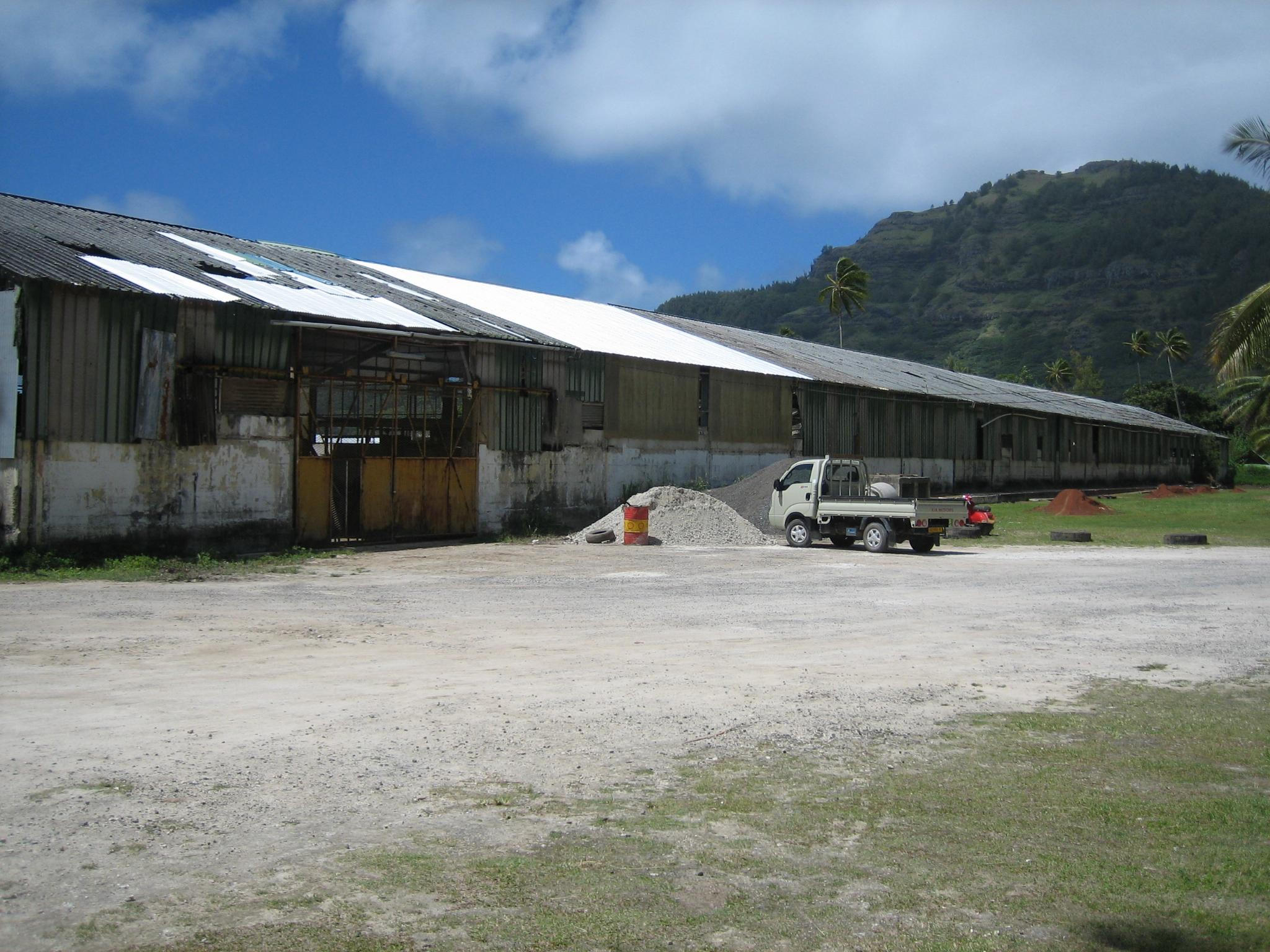 Bunker servant à abriter la population des Gambier lors des tirs d’essais nucléaires, improprement appelé "Blockhaus" par la population mangarévienne.